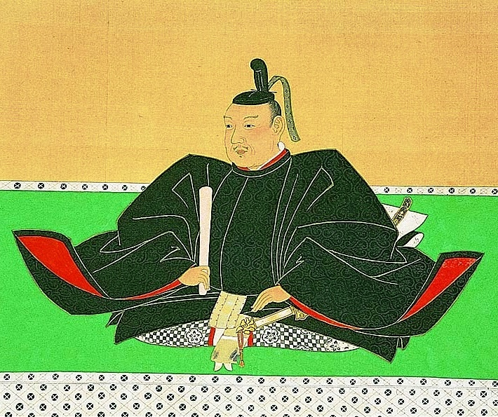 戦国～安土桃山時代の武将、酒井忠次の肖像画